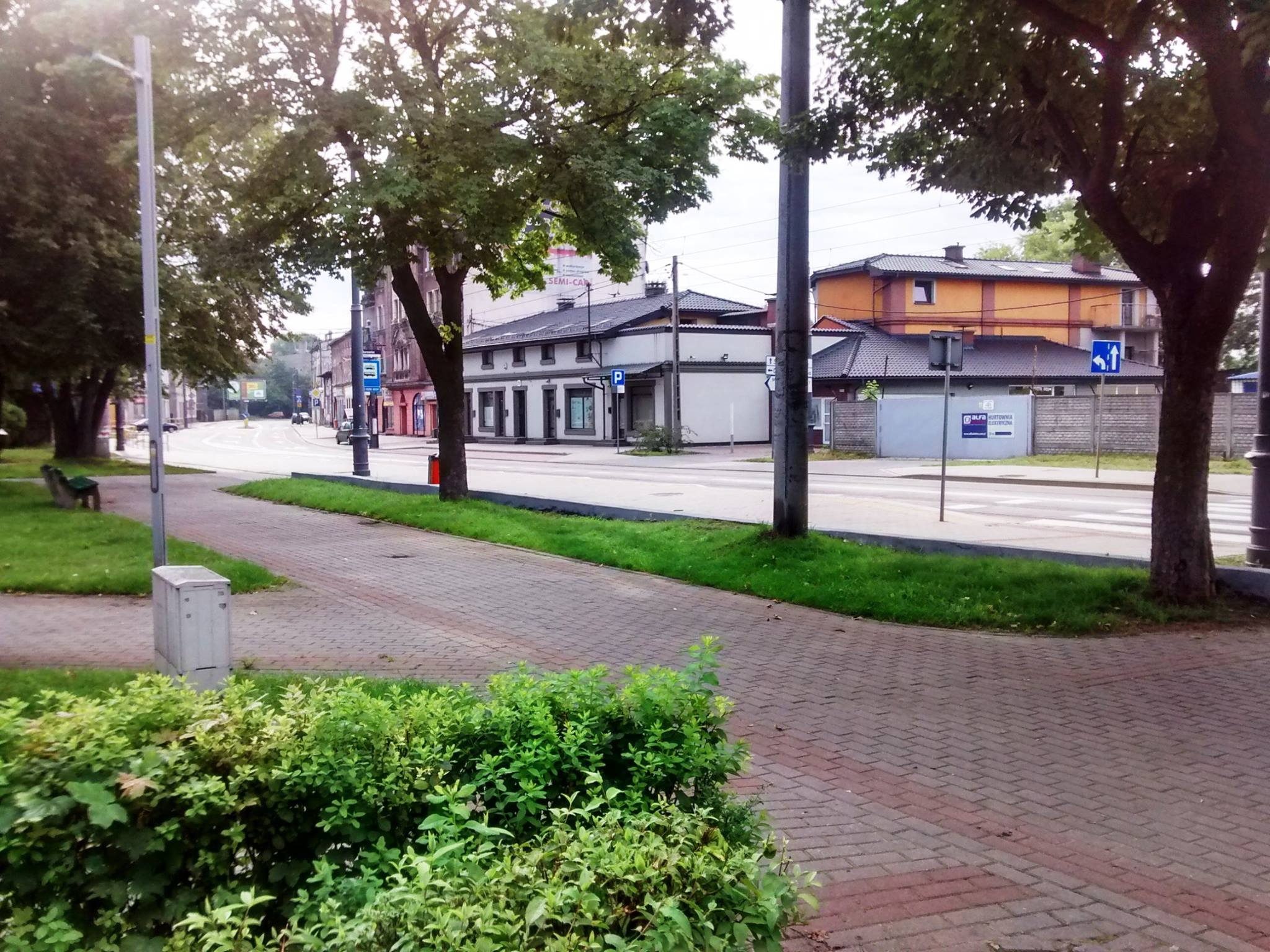 Skwer Hilarego Krzysztofiaka w dzielnicy Burowiec w Katowicach